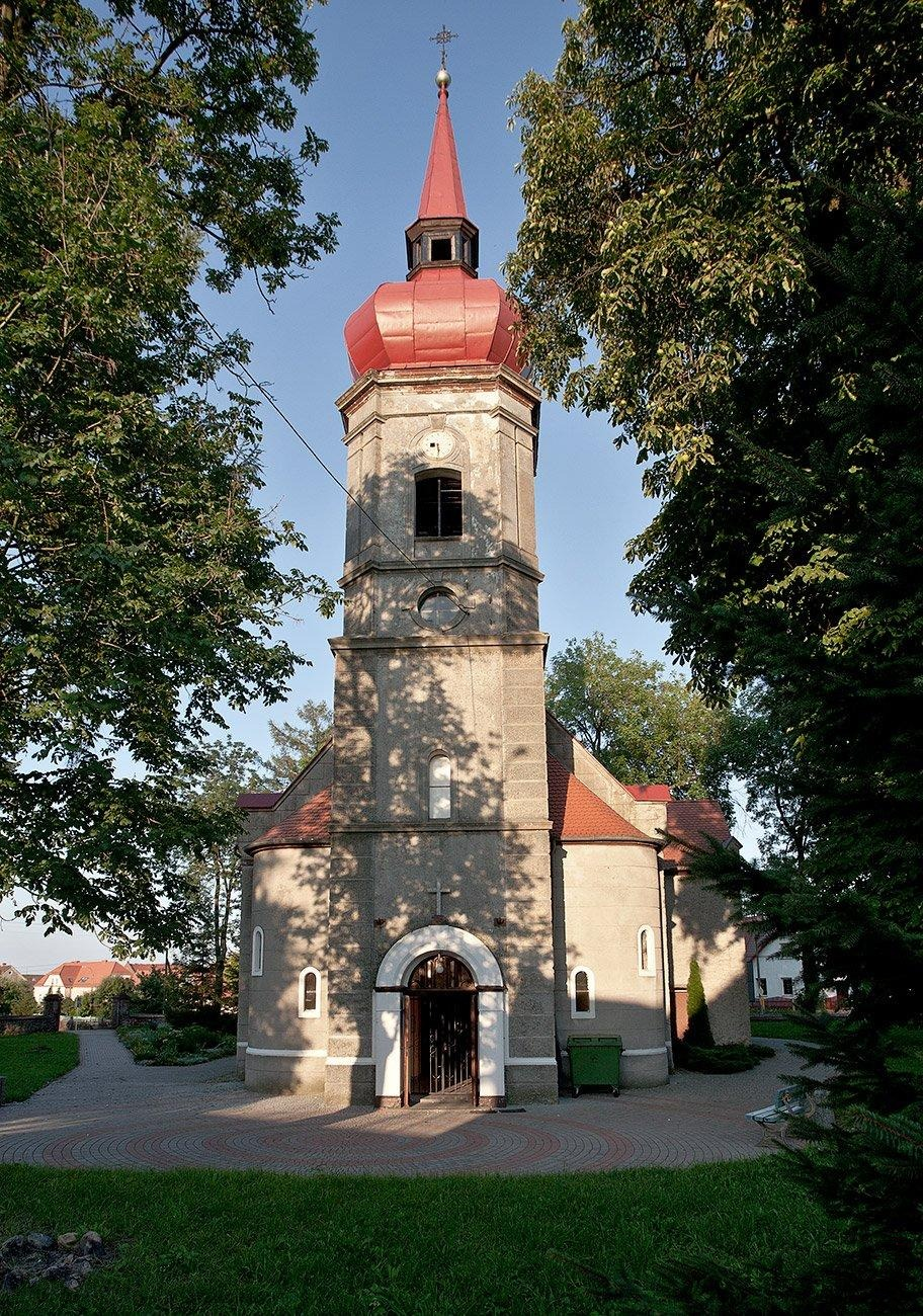 W 1895 roku kościół długoszyński przeszedł gruntowny remont. W 1907 roku drewniana wieża została zastąpiona przez nowo wzniesioną, kamienną, zwieńczoną dachem cebulastym.